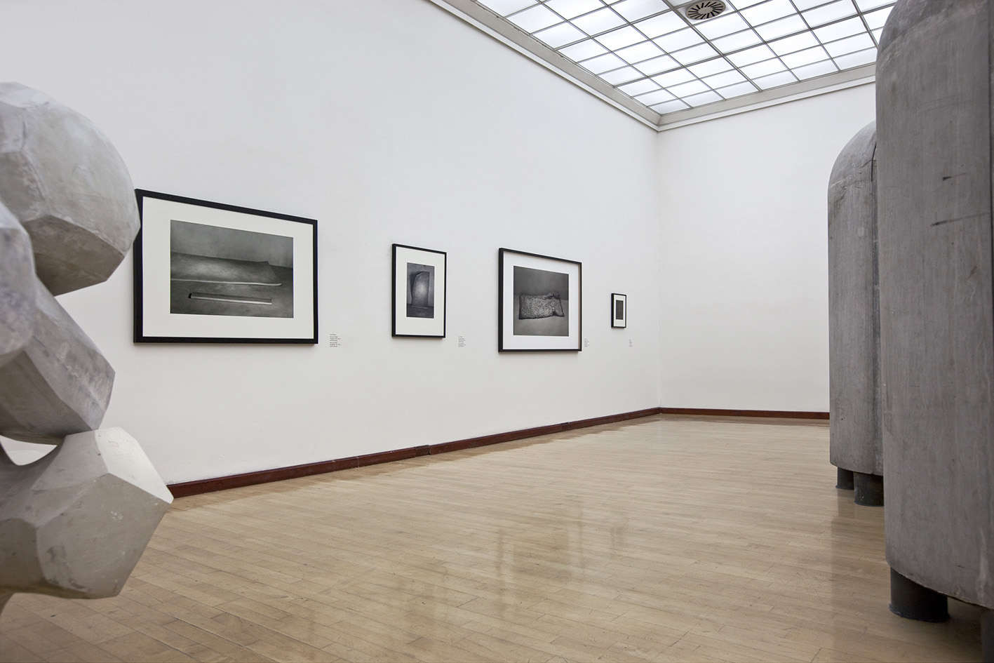 výstava